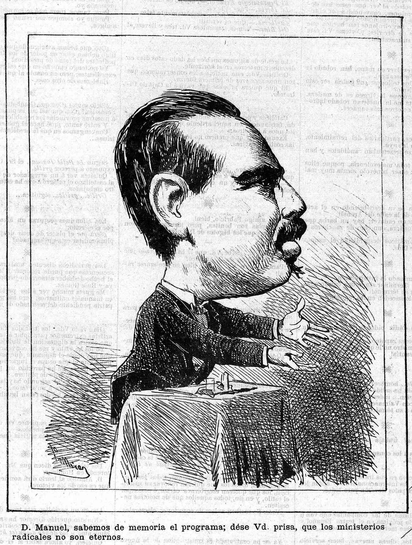 D. Manuel, sabemos de memoria el programa, dése Vd. prisa, que los ministerios radicales no son eternos, en la revista satírica española Gil Blas.